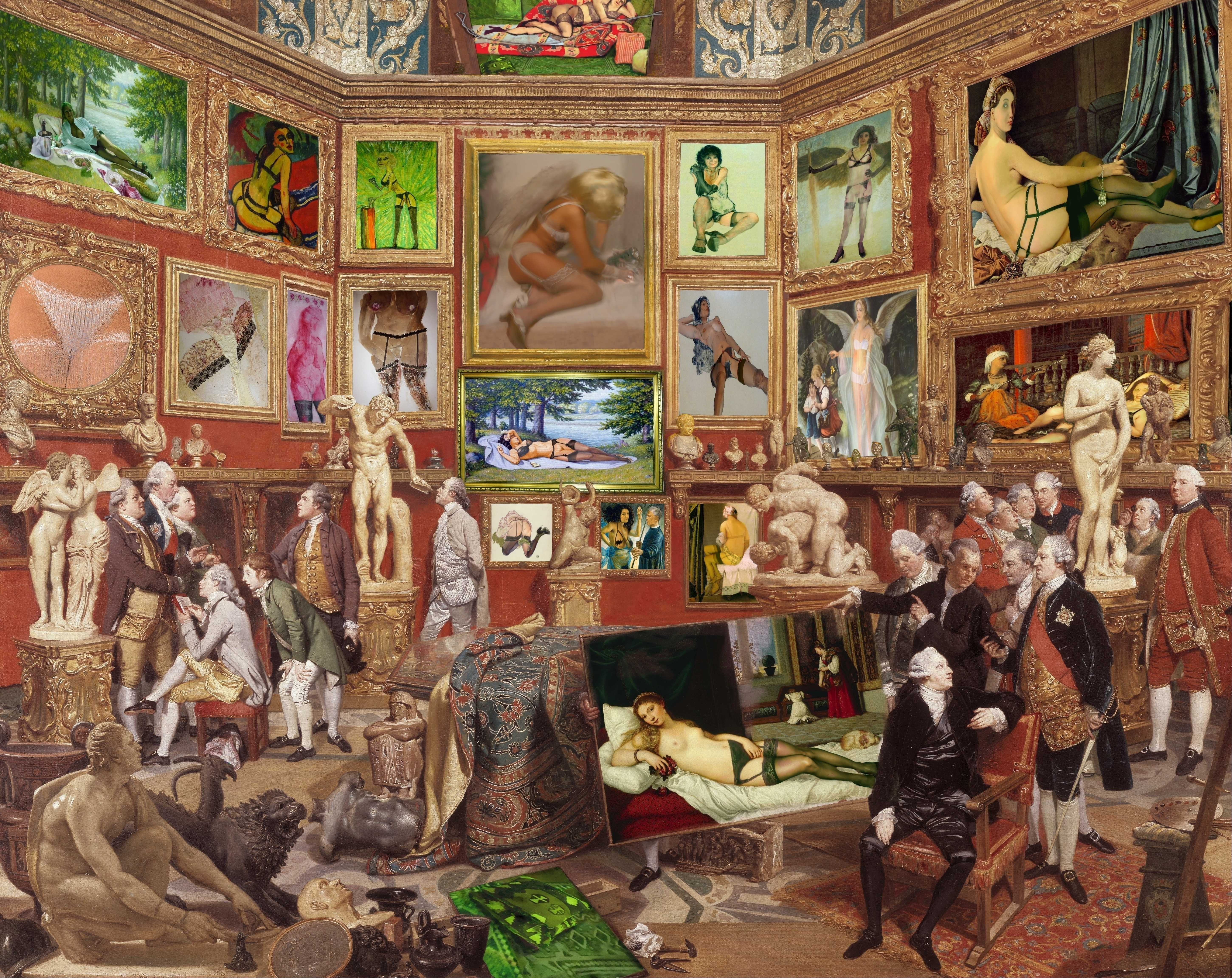 CG-Print auf Leinwand 150x100 cm